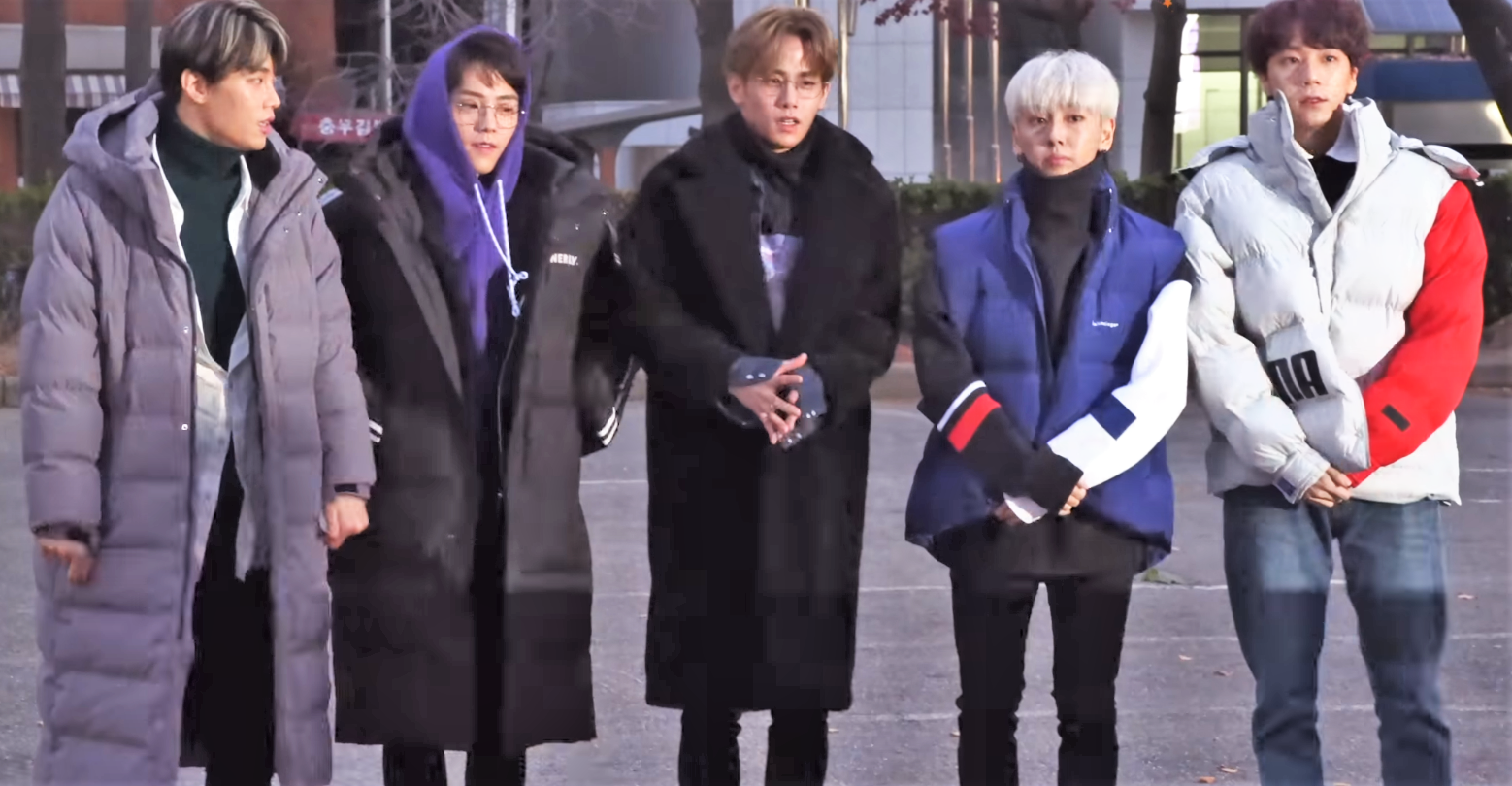 핫샷(HOTSHOT)@ 181123 KBS MUSIC BANK